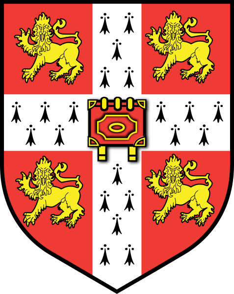 Das Siegel der University of Cambridge, vertreten auf jedem Prüfungsbogen und der Urkunde